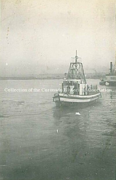 Fireboat Bill Kettner, 1921, San Diego.